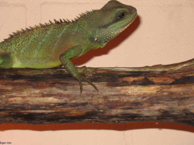 Agame (Physignathus cocincinus).